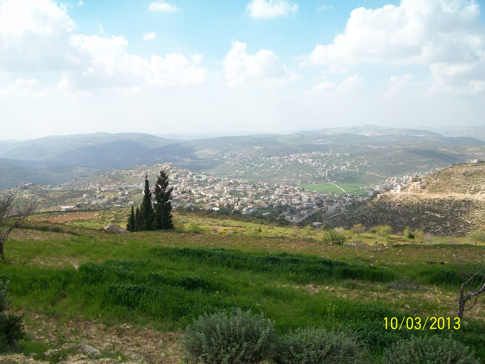 صورة لبلدة قبلان